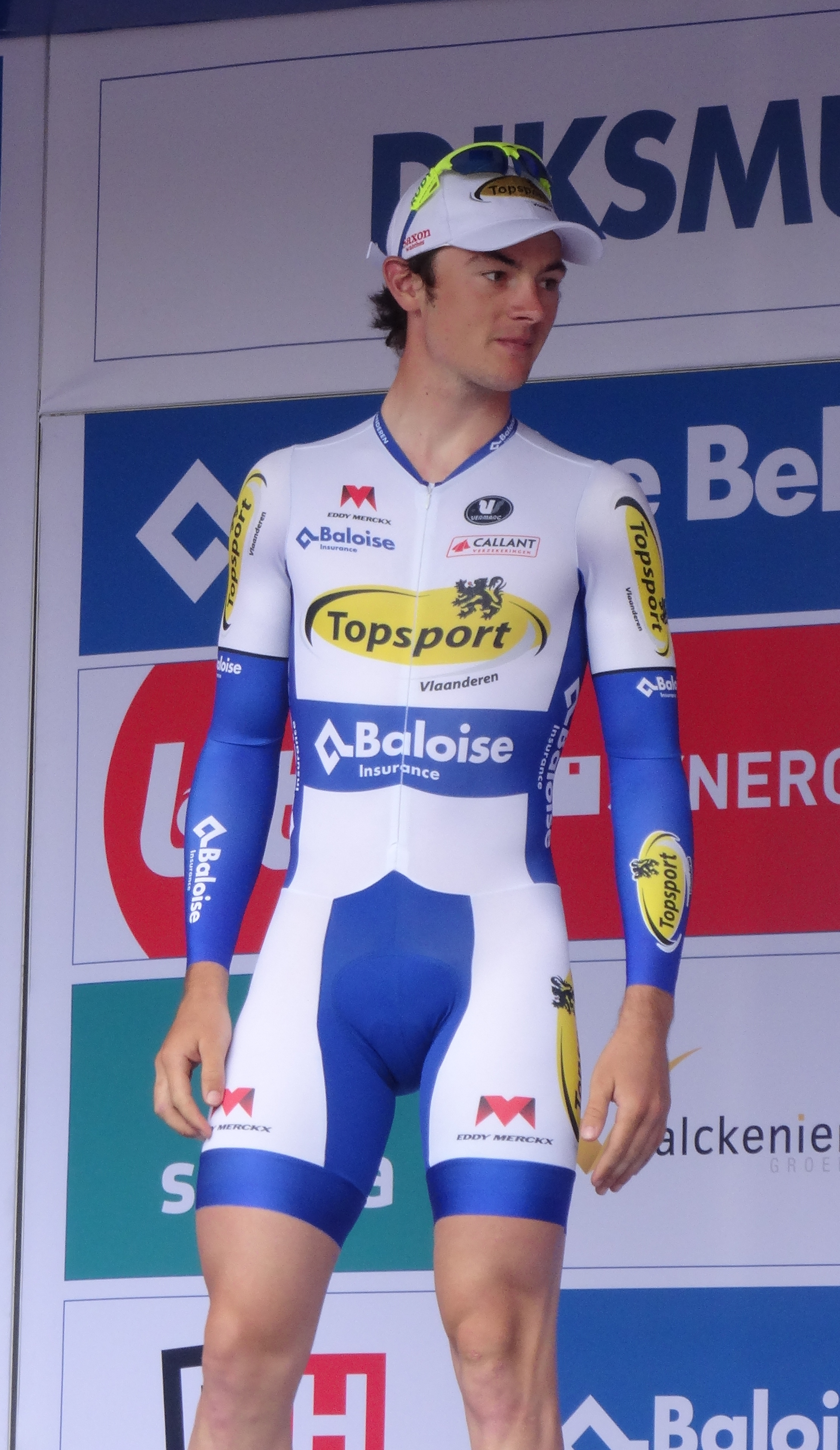 Reportage photographique réalisé le vendredi 30 mai à l'occasion du contre-la-montre individuel de la troisième étape du Tour de Belgique 2014 à Dixmude, Belgique.